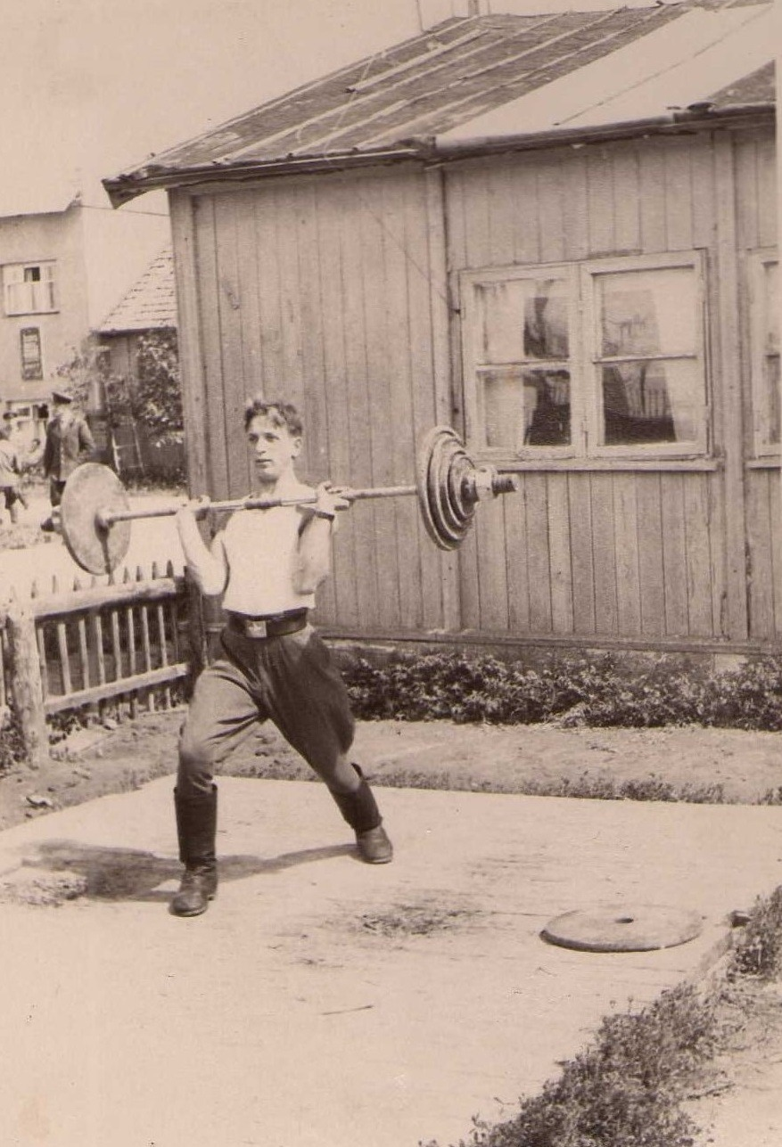 Армейский жим